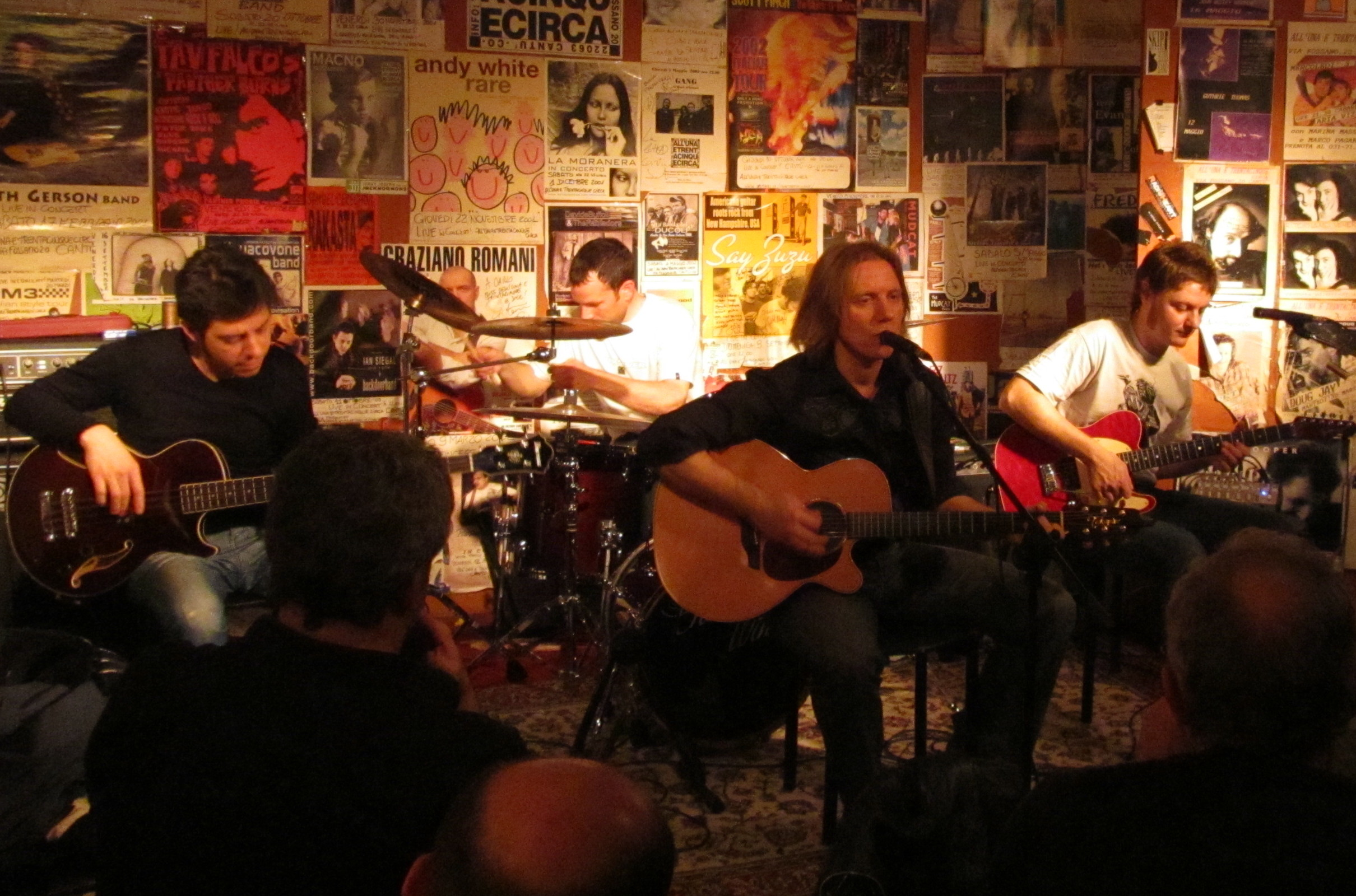 I cheap wine all'una e trentacinque circa